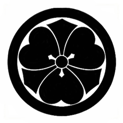 丸に剣片喰